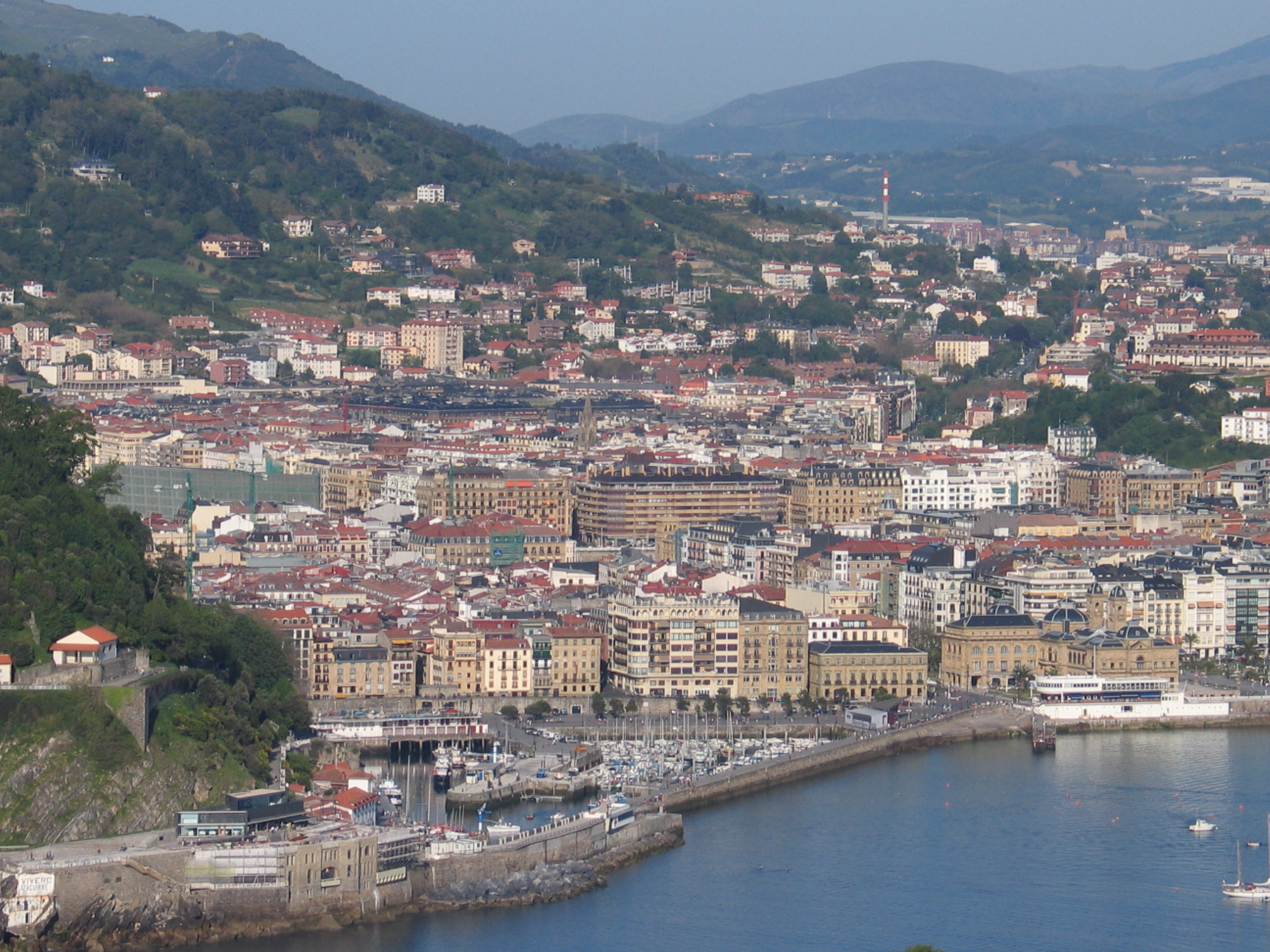 San Sebastián desde la Isla de Santa Clara